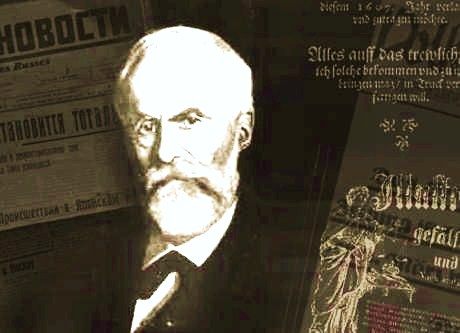 Porträt des Privatgelehrten und Sammlers Oskar von Forckenbeck